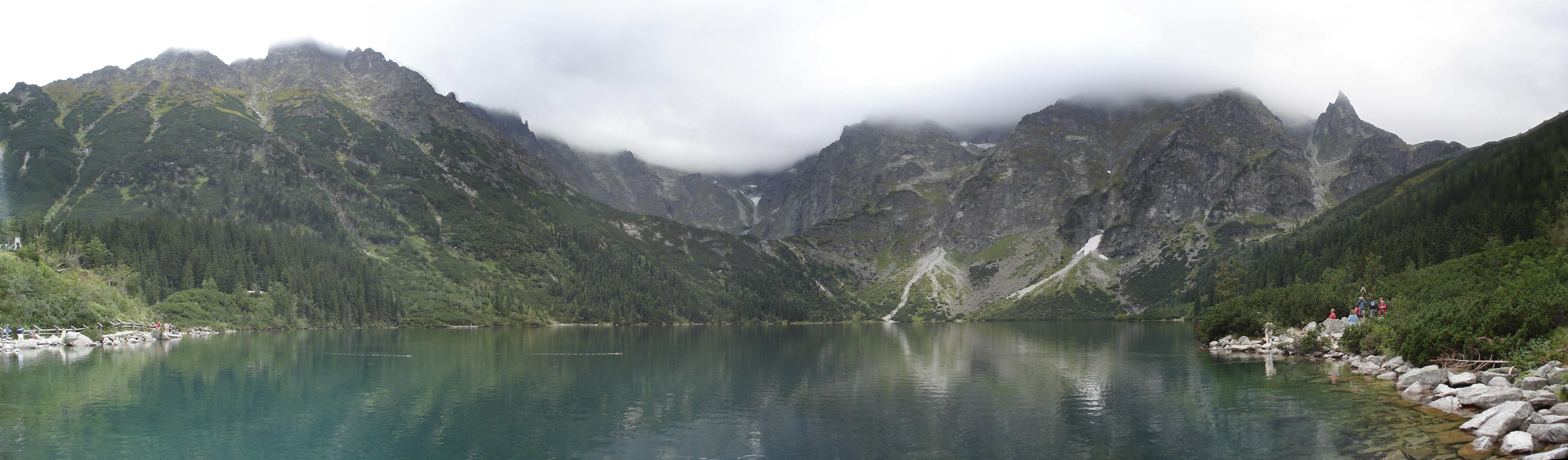 Morskie Oko lake, Poland